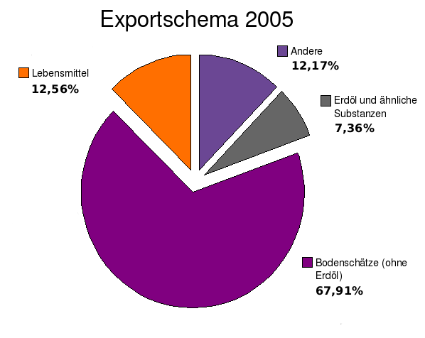 Jamiacan Export 2005